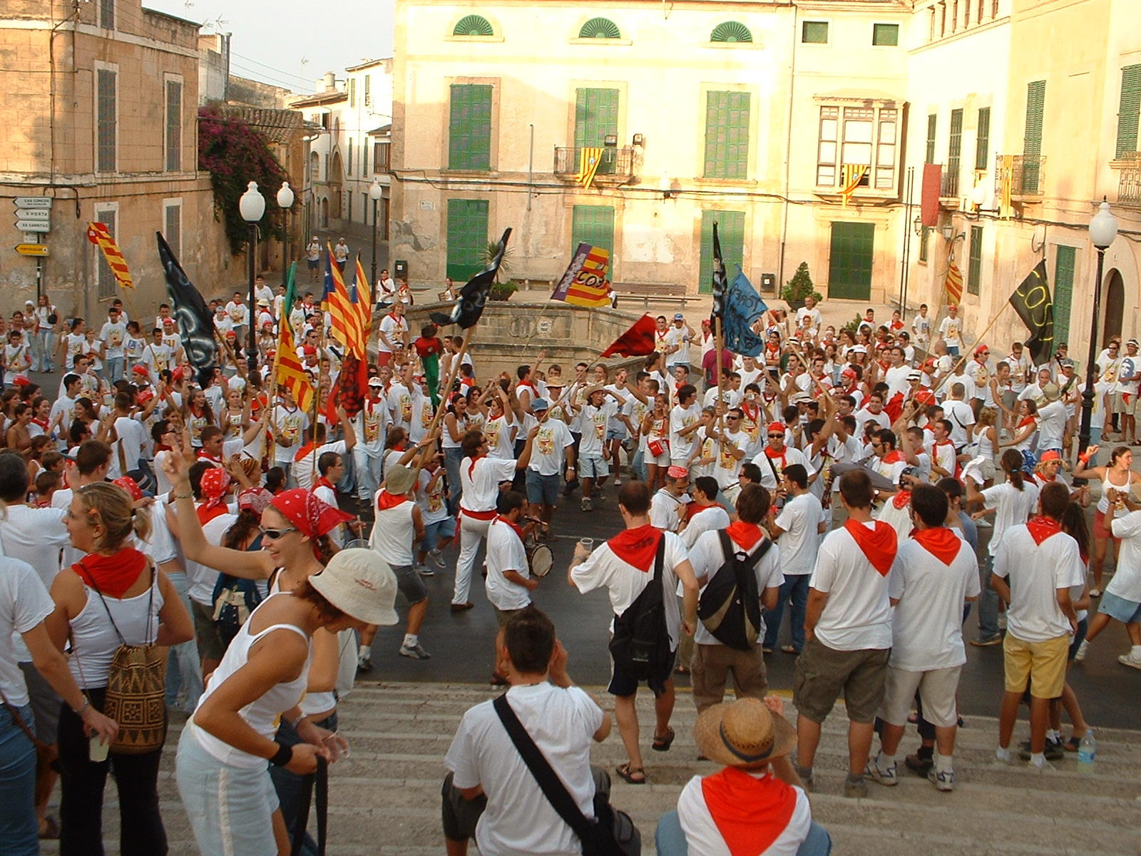 La penya el Coso celebrant la "resurecció de la Quica" Festes de Sant Agustí, Felanitx.